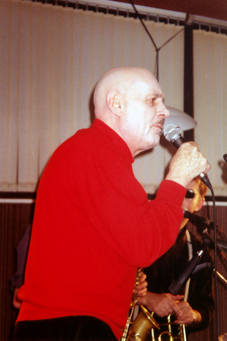 Le Professeur Choron en concert le 7 et le 8 décembre 1996, à la Maison de la culture Louis Aragon d'Hagondange, avec le groupe Tes Baisers ont le Goût de la mort.